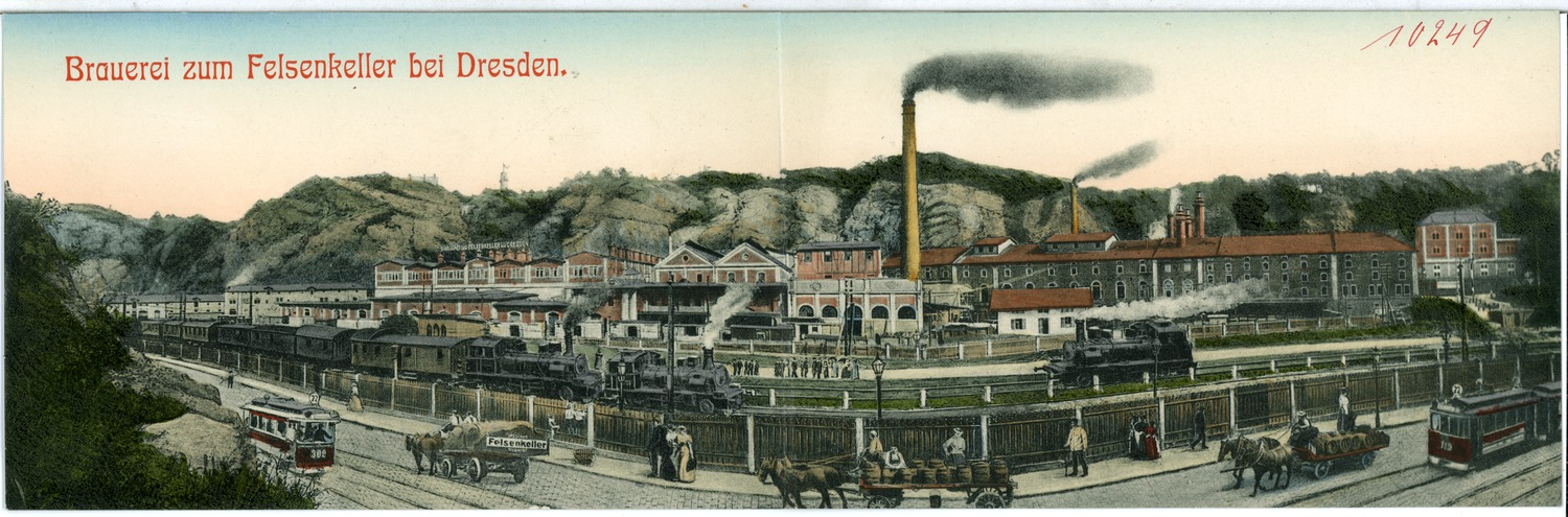 Dresden; Felsenkeller-Brauerei mit Eisenbahn, Straßenbahn This postcard is from publisher Brück & Sohn in Meißen ( postcard has a unique number 10249 and is available in a higher resolution at the publisher. This images was uploaded in a cooperation project between Wikipedians and the publisher.